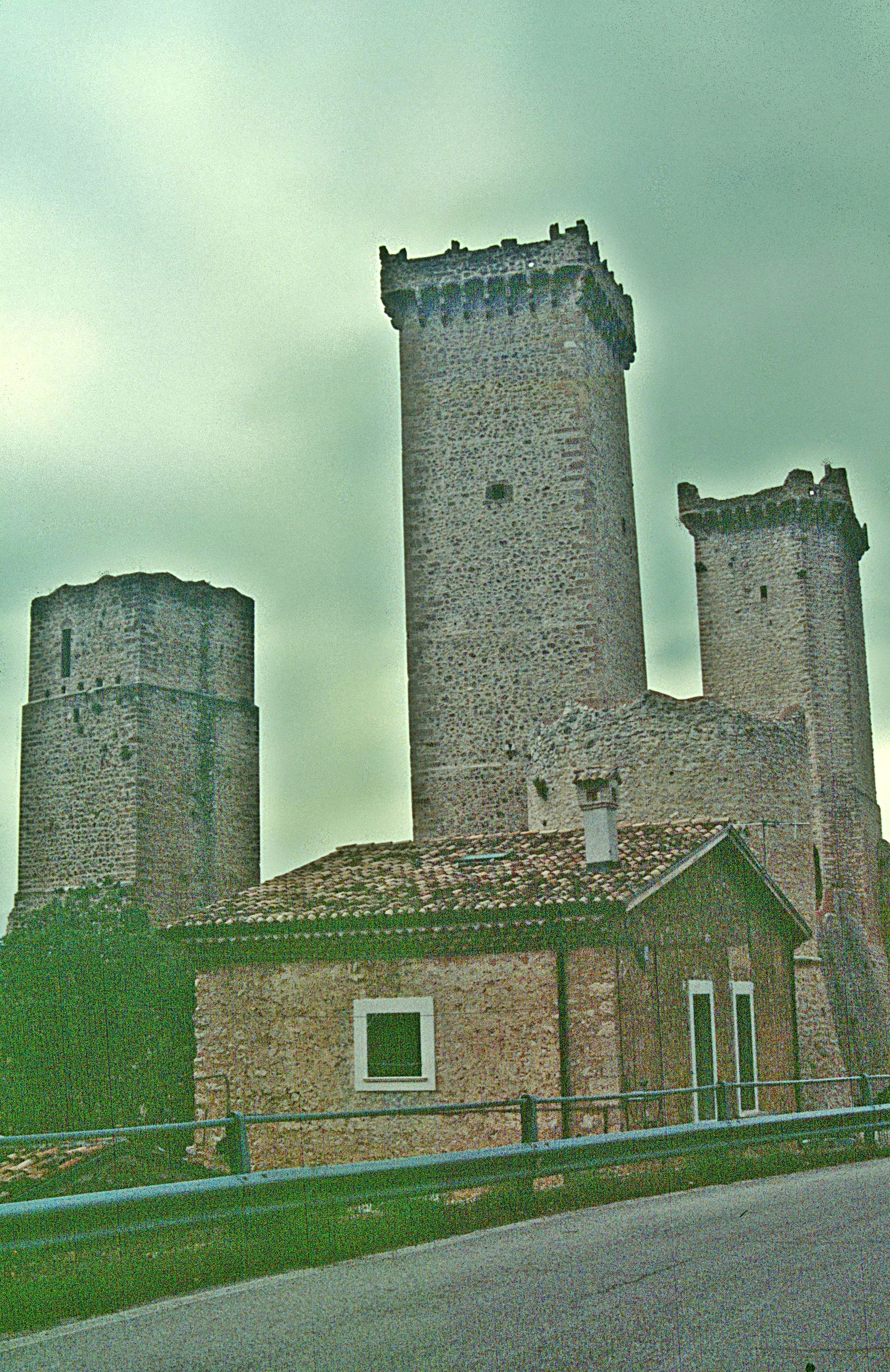 Pacentro: Castello Cantelmo-Caldora